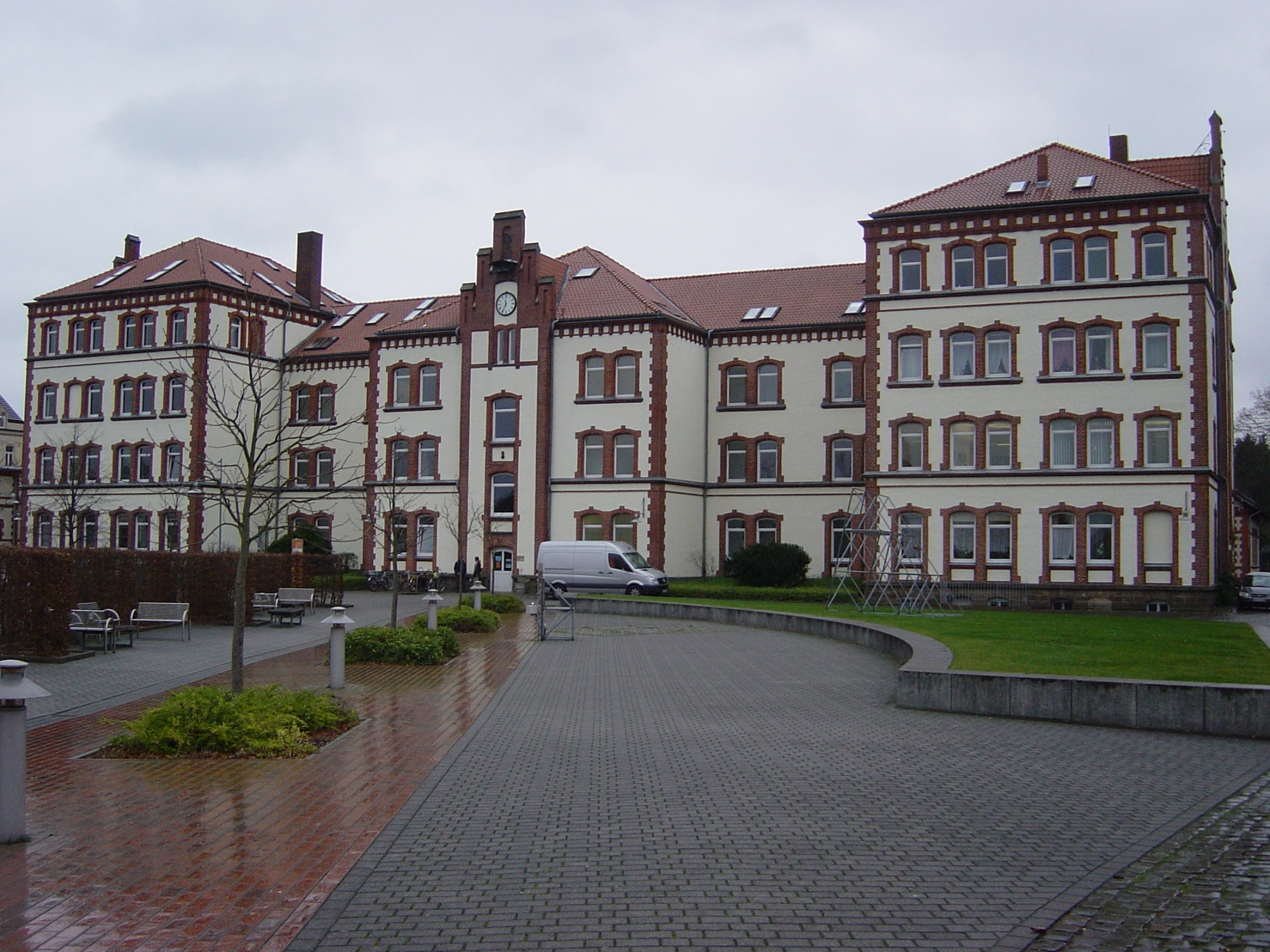 Fachhochschule Bielefeld - Campus Minden, Artilleriestr. 9, 32427 Minden. Ehemals Artilleriekaserne